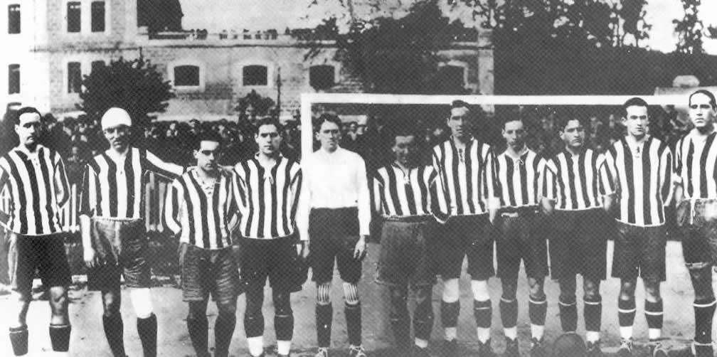 Plantilla del Campeón de España de 1921.